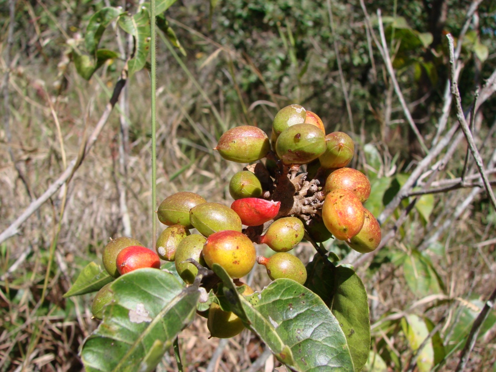 Protium ovatum - BURSERACEAE Jardim Botanico de Brasília - Distrito Federal - Brasil.